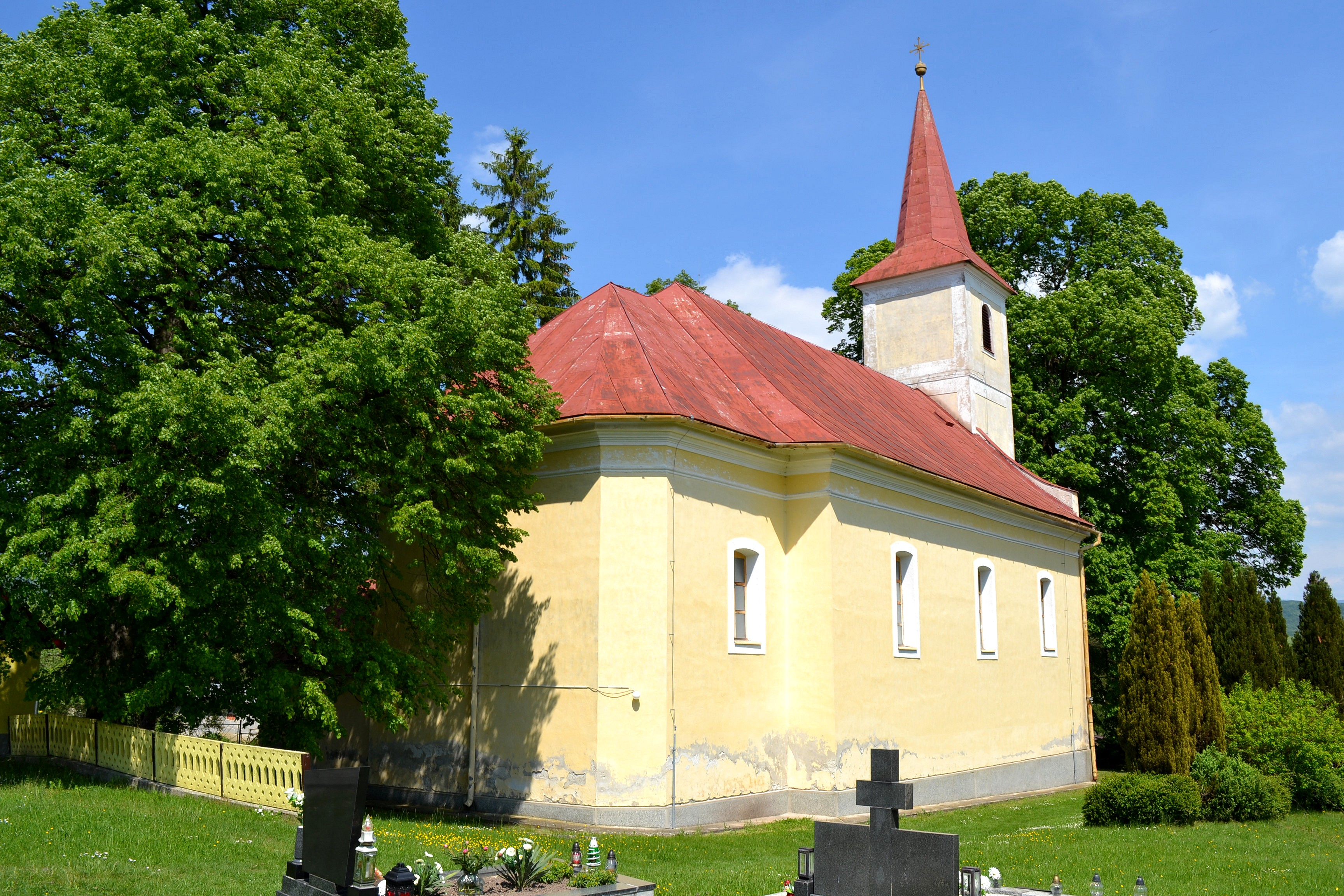 Kosorín (okr. Žiar nad Hronom), Kostol svätého Ladislava; celkový pohľad zo severovýchodu